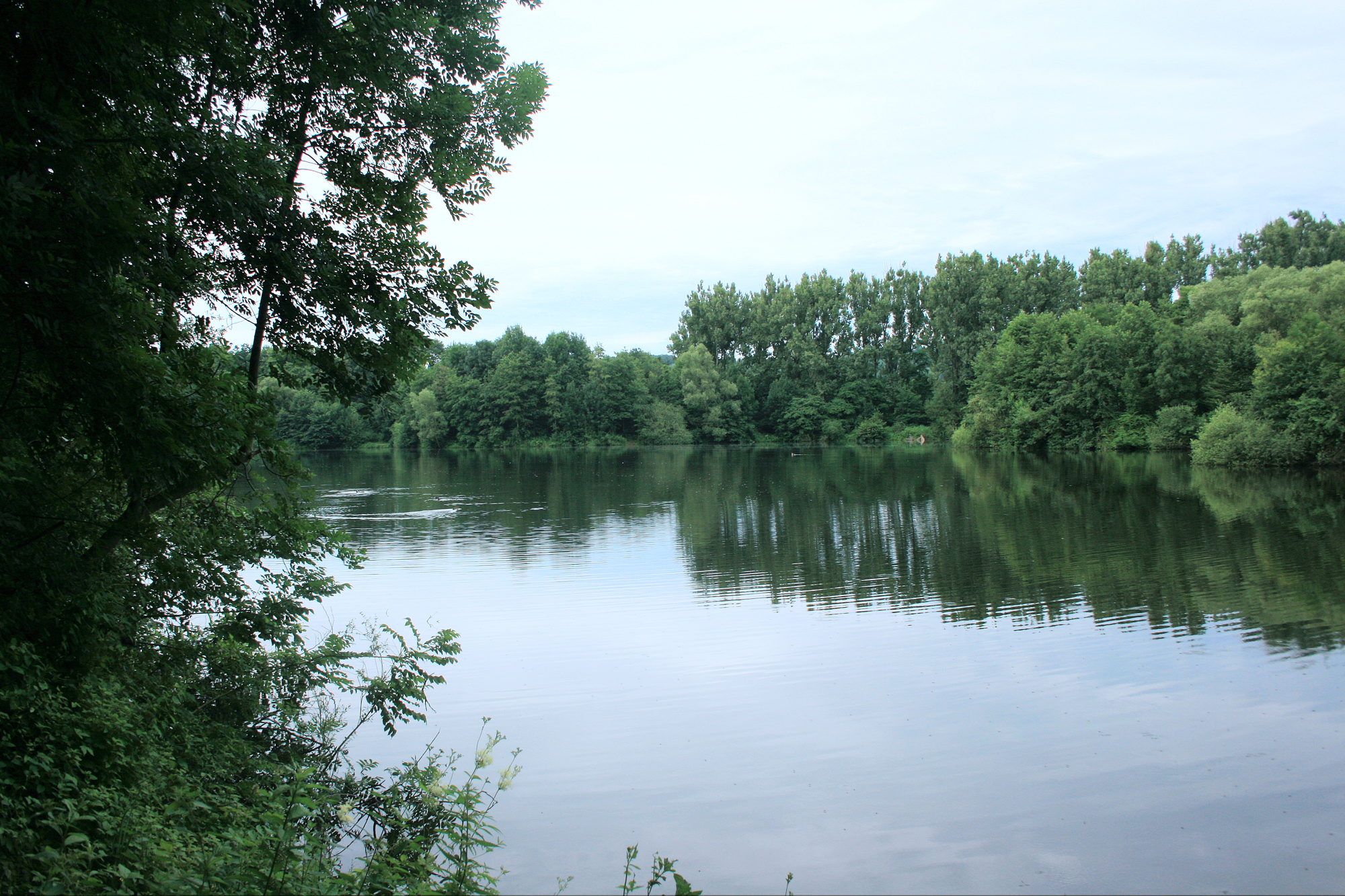 Dondorfer See